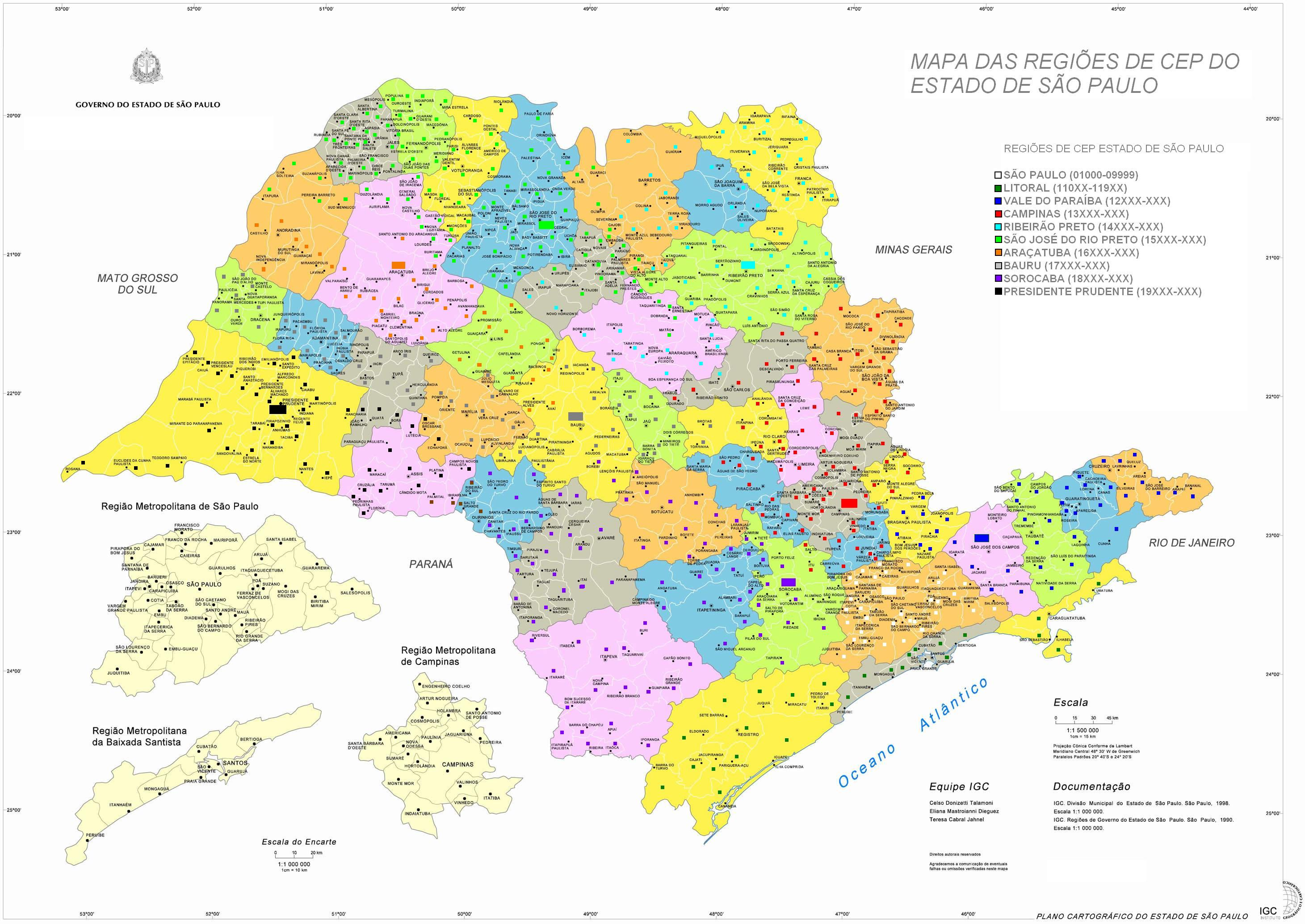 Divisão das regiões do estado de São Paulo por faixa de CEP